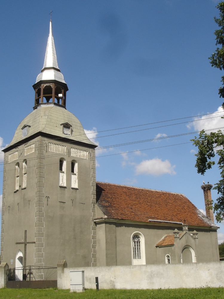 Stary Przylep (pow. pyrzycki) kościół